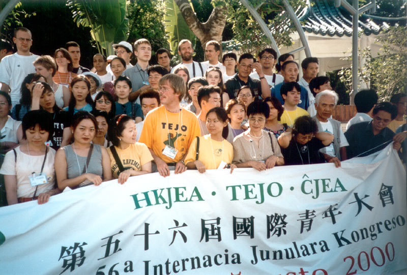 Anoj de la IJK 2000 en Honkongo